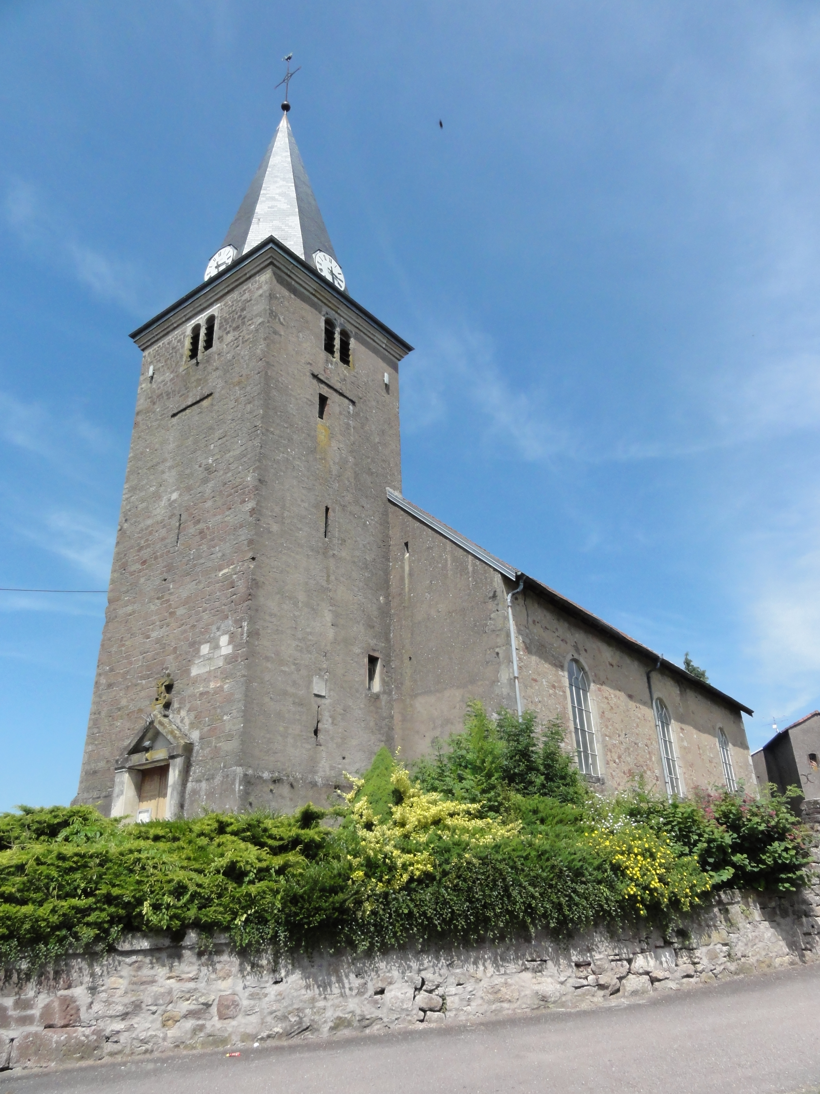 Vacqueville (M-et-M) église